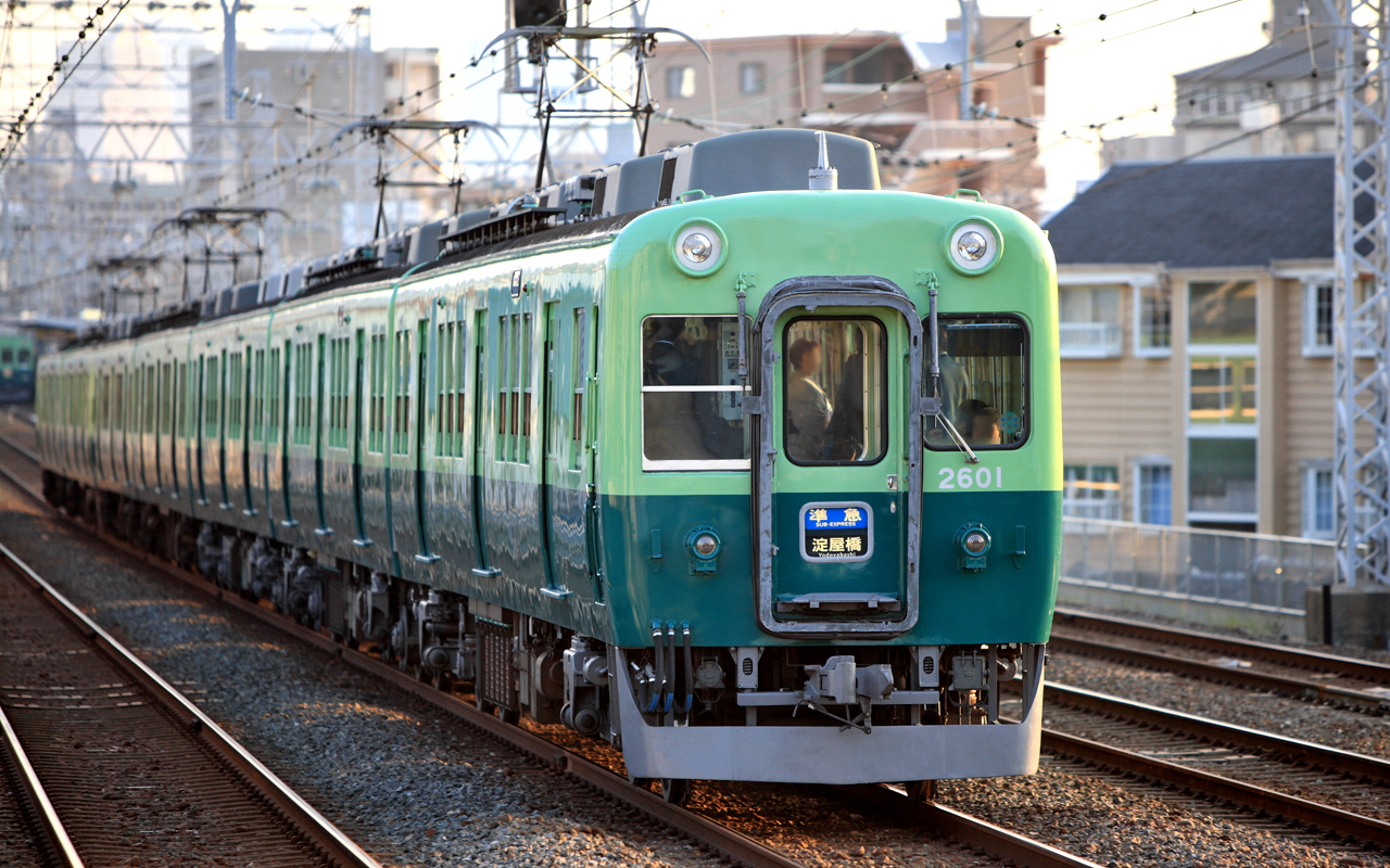 Keihan 2600 Series EMU.